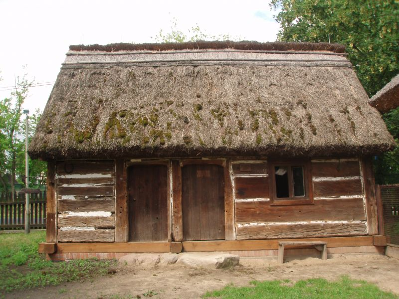 Chałupa parobków pracujących u karczmarza. Budynek o konstrukcji sumikowo-łatkowej. Dach dwuspadowy kryty słomianą strzechą. Fundament z cegły.